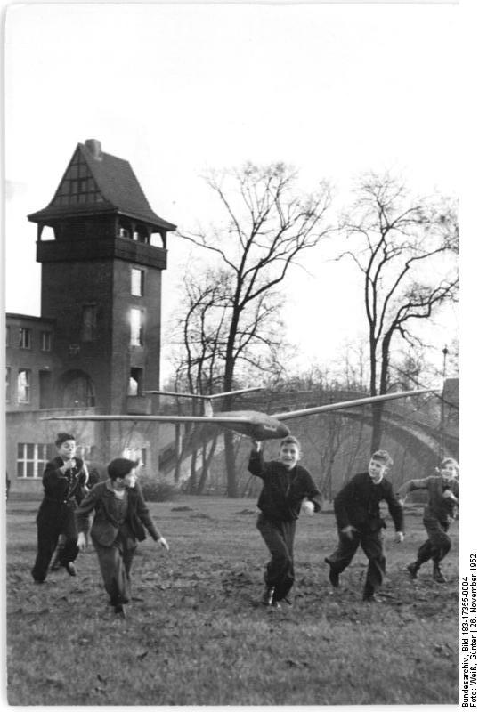 Berlin-Teptow, Insel der Jugend, Station Junger Techniker Zentralbild Weiß 26.11.1952 In der Station Junger Techniker auf der Abteiinsel in Berlin-Treptow der zentralen Musterstation für die DDR, bestehen für Thälmann-Pioniere und Schüler vom 5. bis zum 8. Schuljahr Interessnensgemeinschaften für Mechanik, Modellbau, Elektrik, Foto und Chemie. Die Leitung der Station liegt in den Händen des Hauptamtes für auserschulische Erziehung. Die Interessensgemeinschaftern werden von Lehrern und Aktivisten aus den Betrieben geleitet. Inen zugeteilt werden ab 1.1.1953 nur wissenschaftliche Mitarbeiter. U.Bz.: Stolz lassen die Flugmodellbauer ihren Segler fliegen.